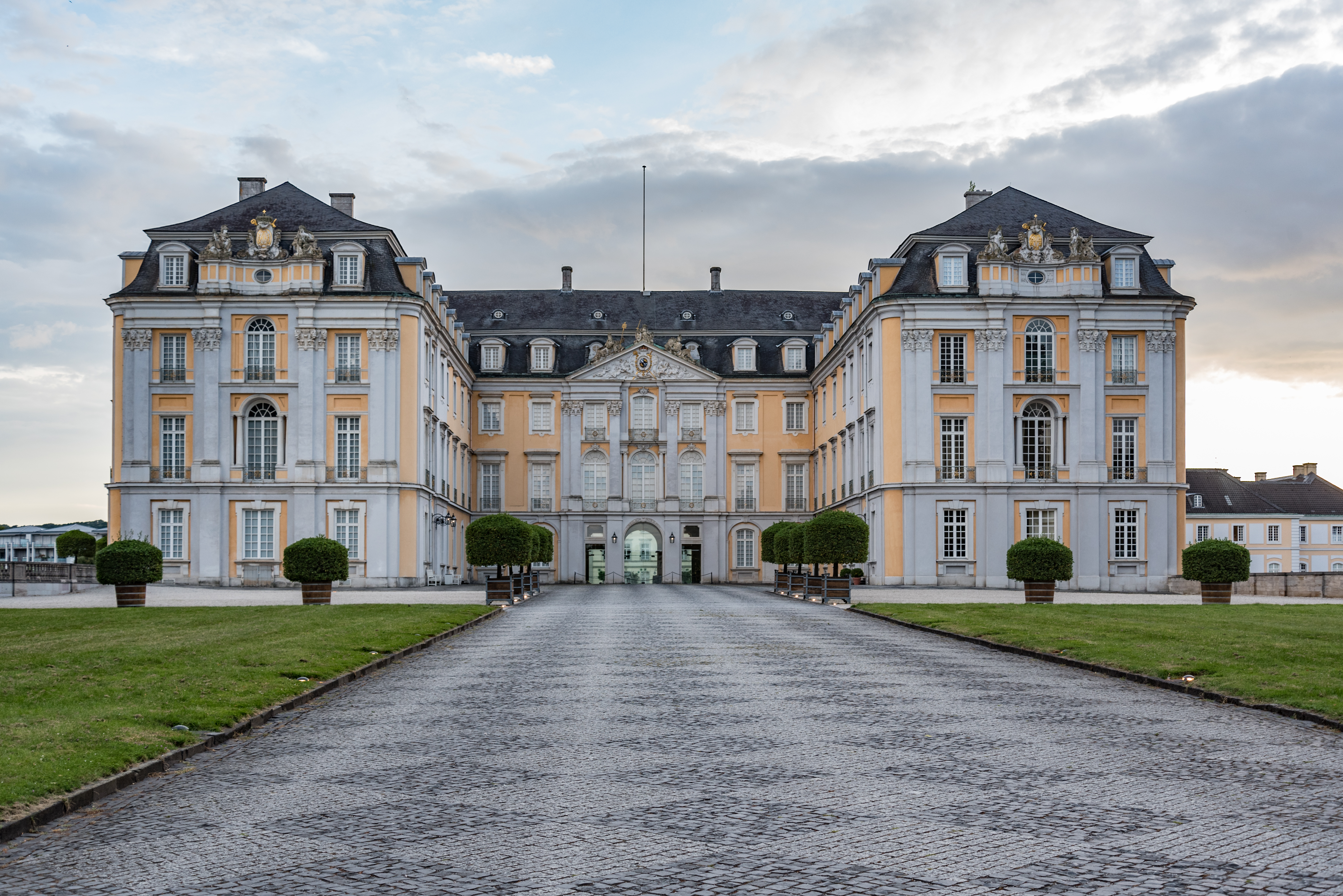 Brühl, Schloss Augustusburg